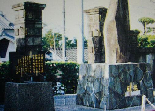 旧制出水中学校門柱